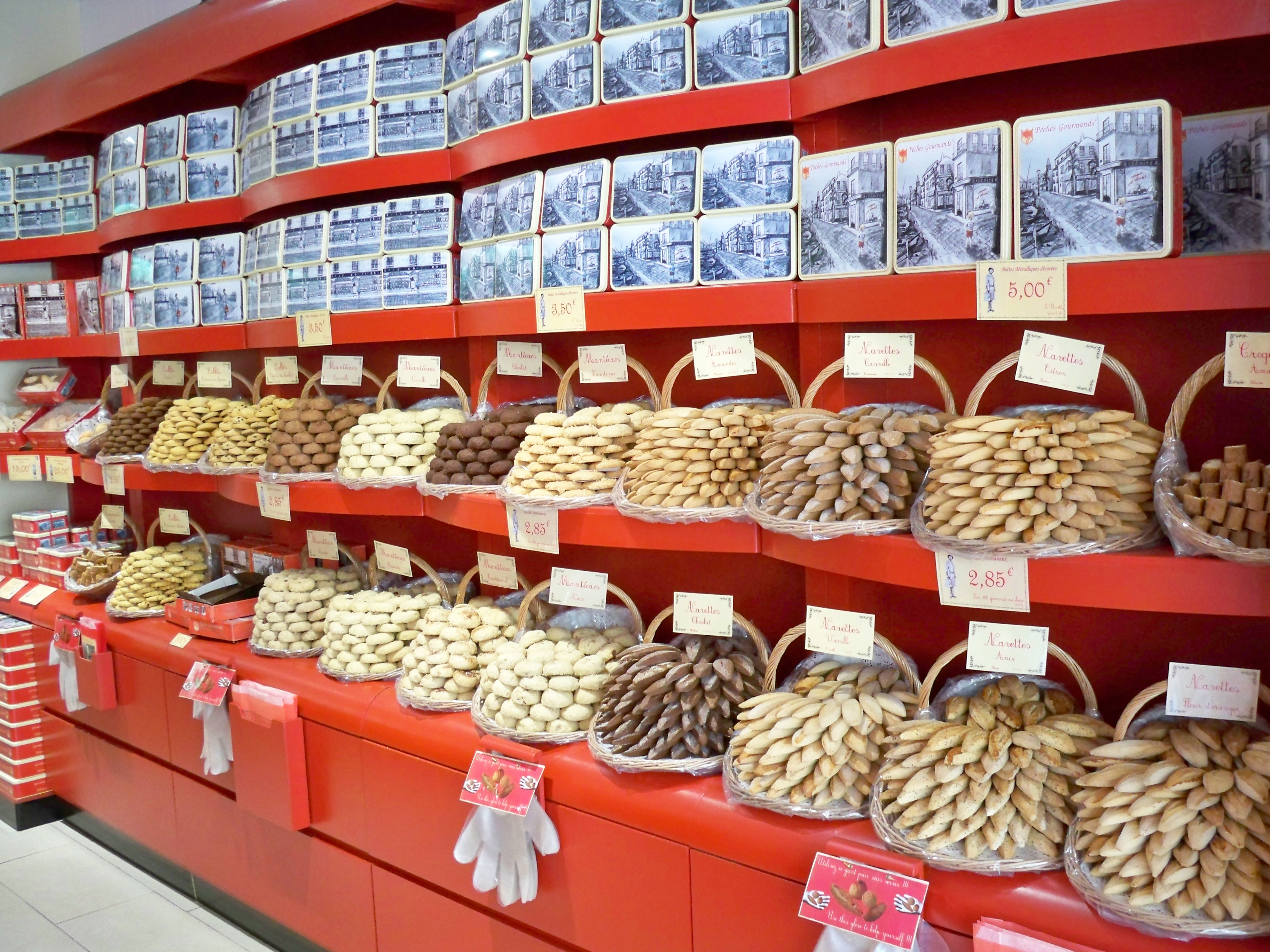 Navettes de Marseilles aux multiples saveurs présentées dans des corbeilles